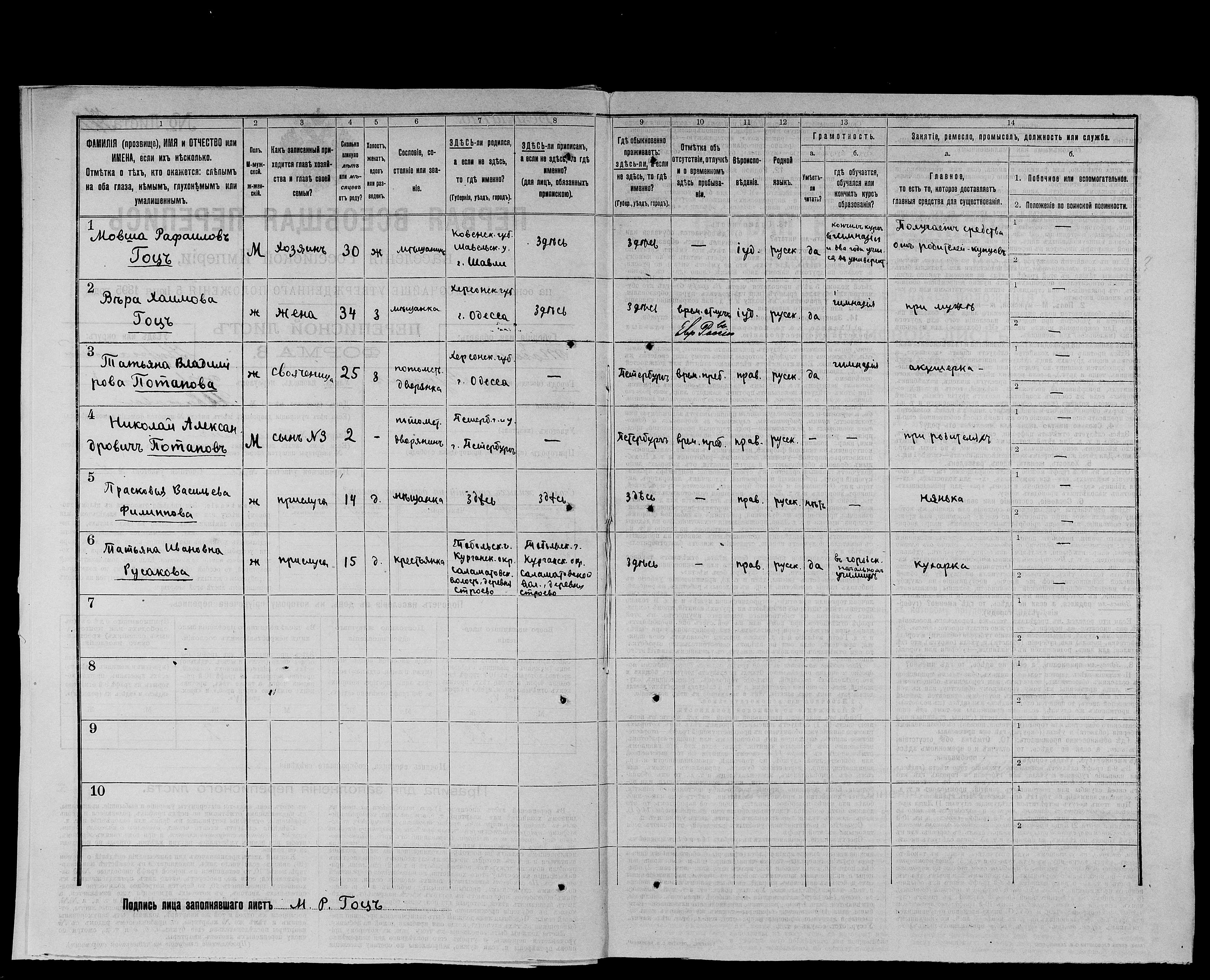 Перепись 1897, Тобольская губерния, г. Курган, семья Гоц